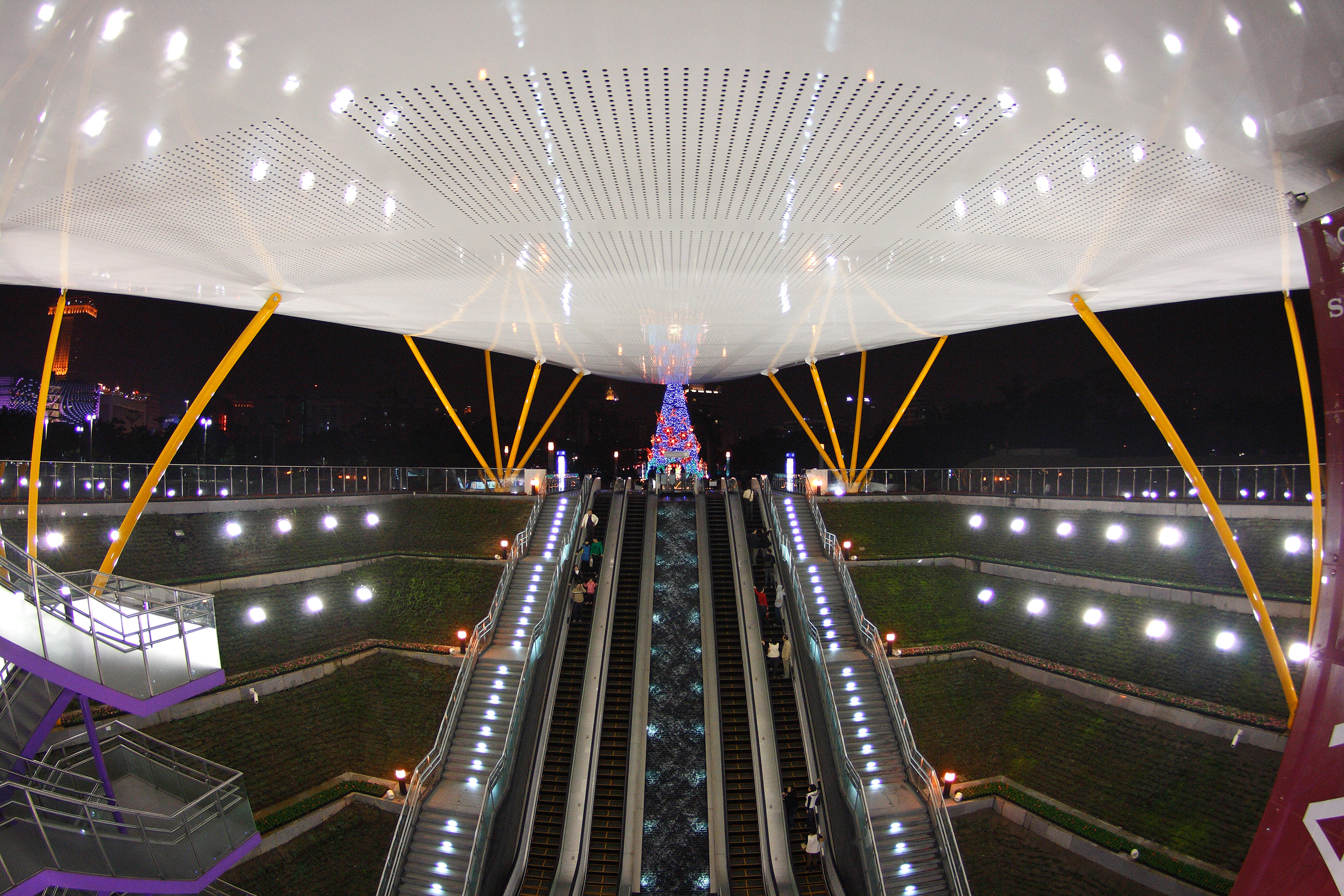 高雄捷運中央公園站一號出口夜景。